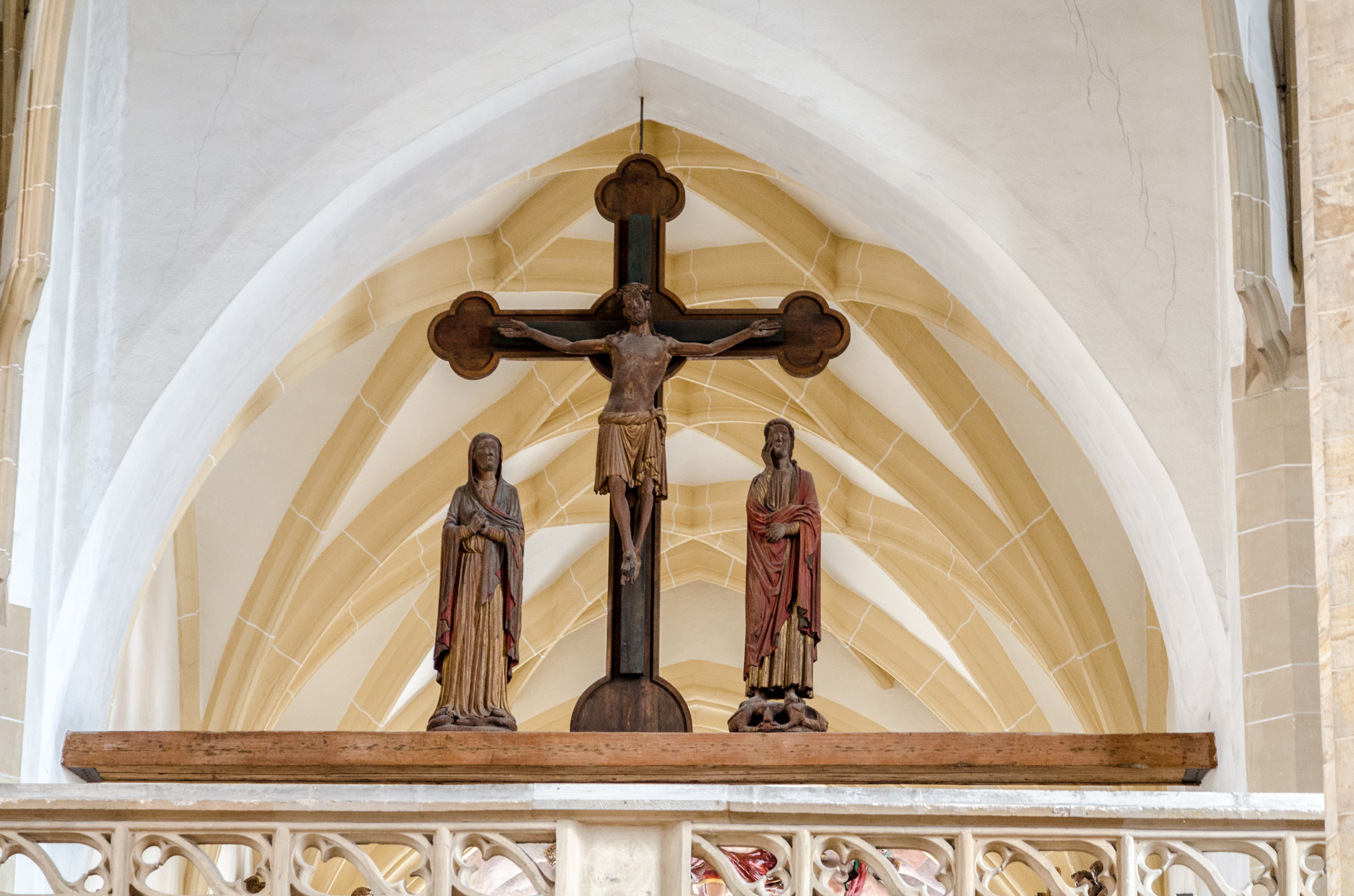 Freiberger Dom